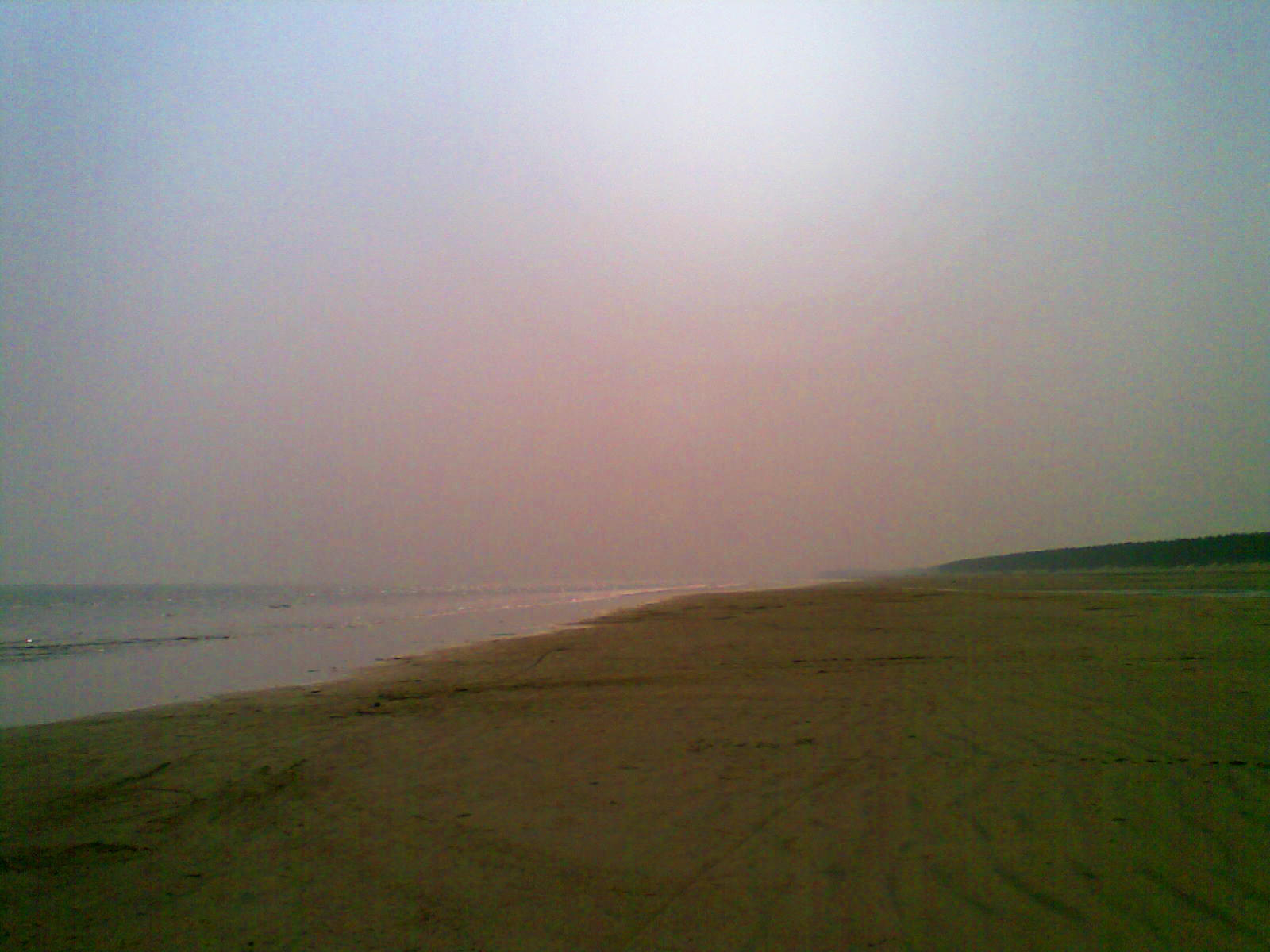 Talasari beach,Baleswsar, Odisha